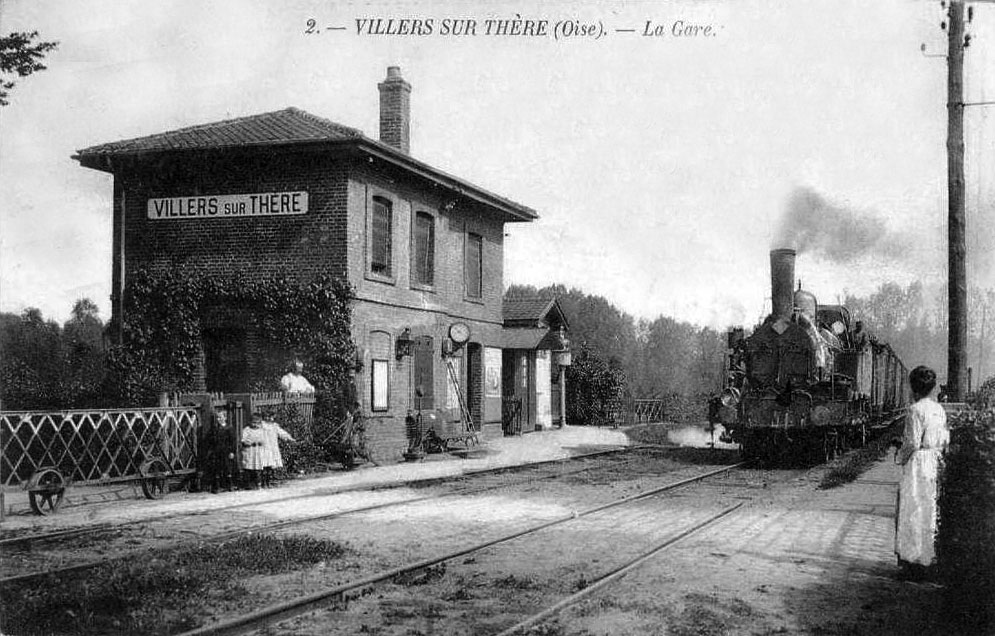 Intérieur de la gare de Villers-sur-Thère sur la ligne de Paris au Tréport, au début des années 1900.